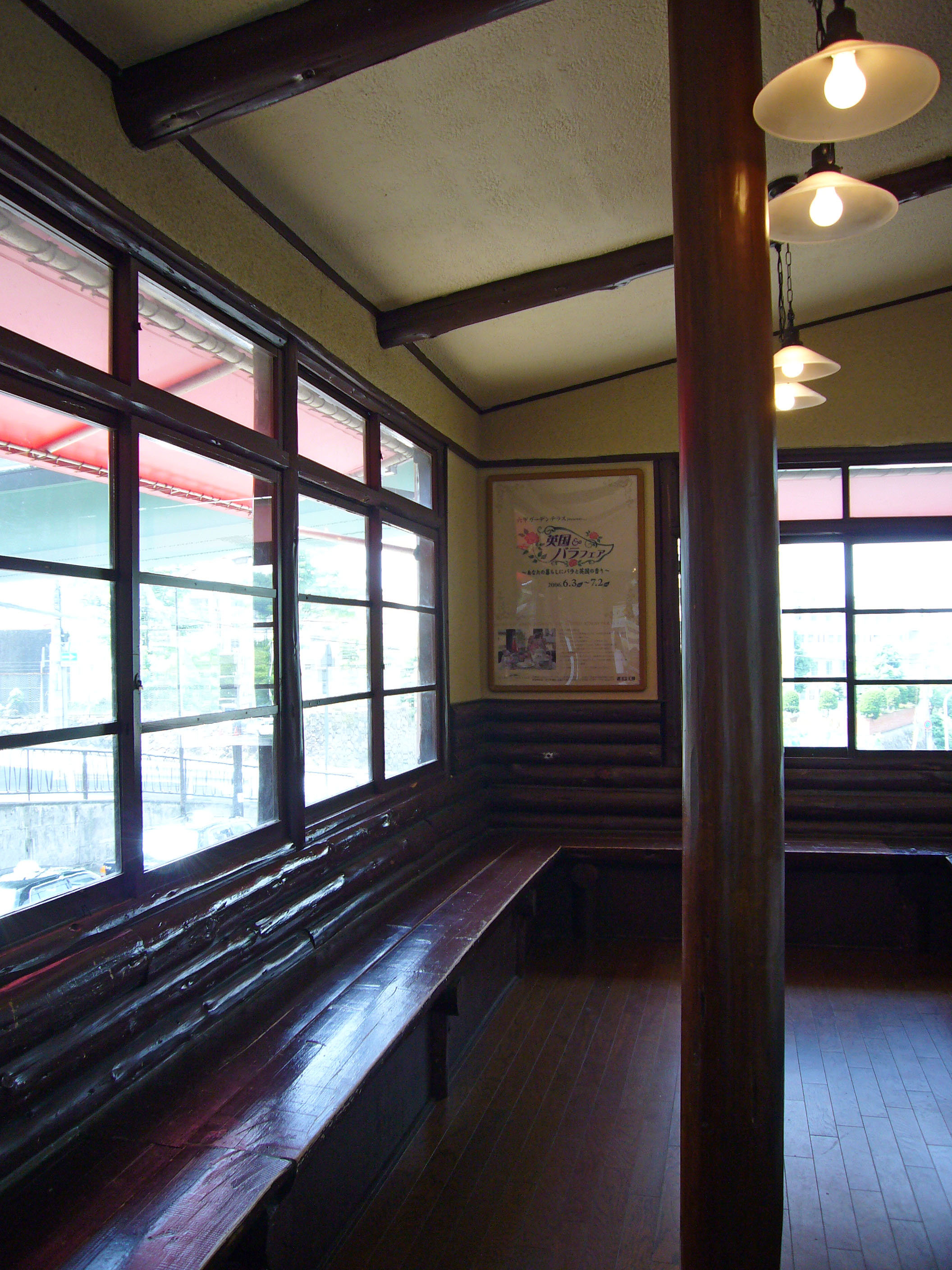 Rokko Cablecar in Kobe, Japan